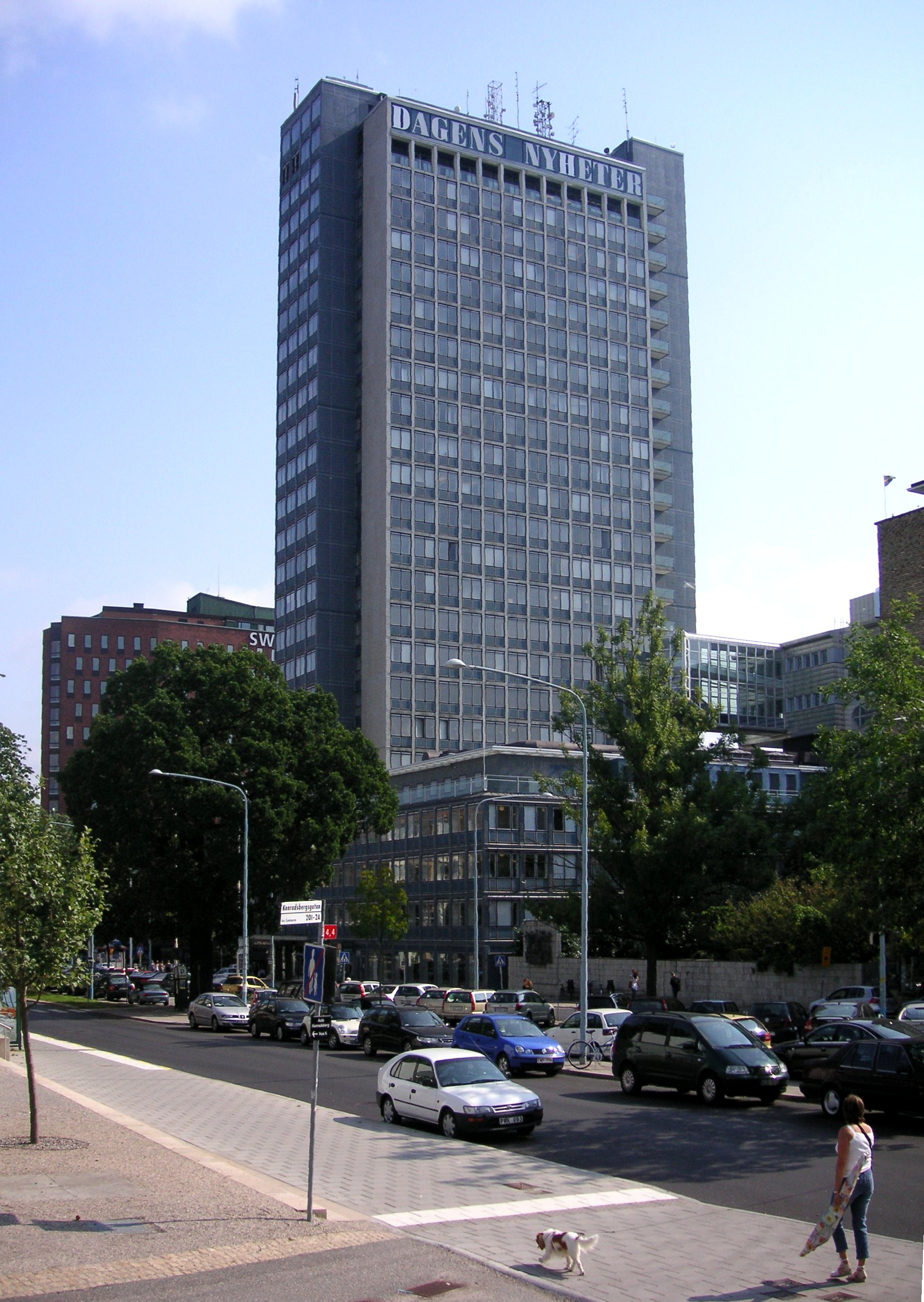 Dagens Nyheters höghus i Stockholm